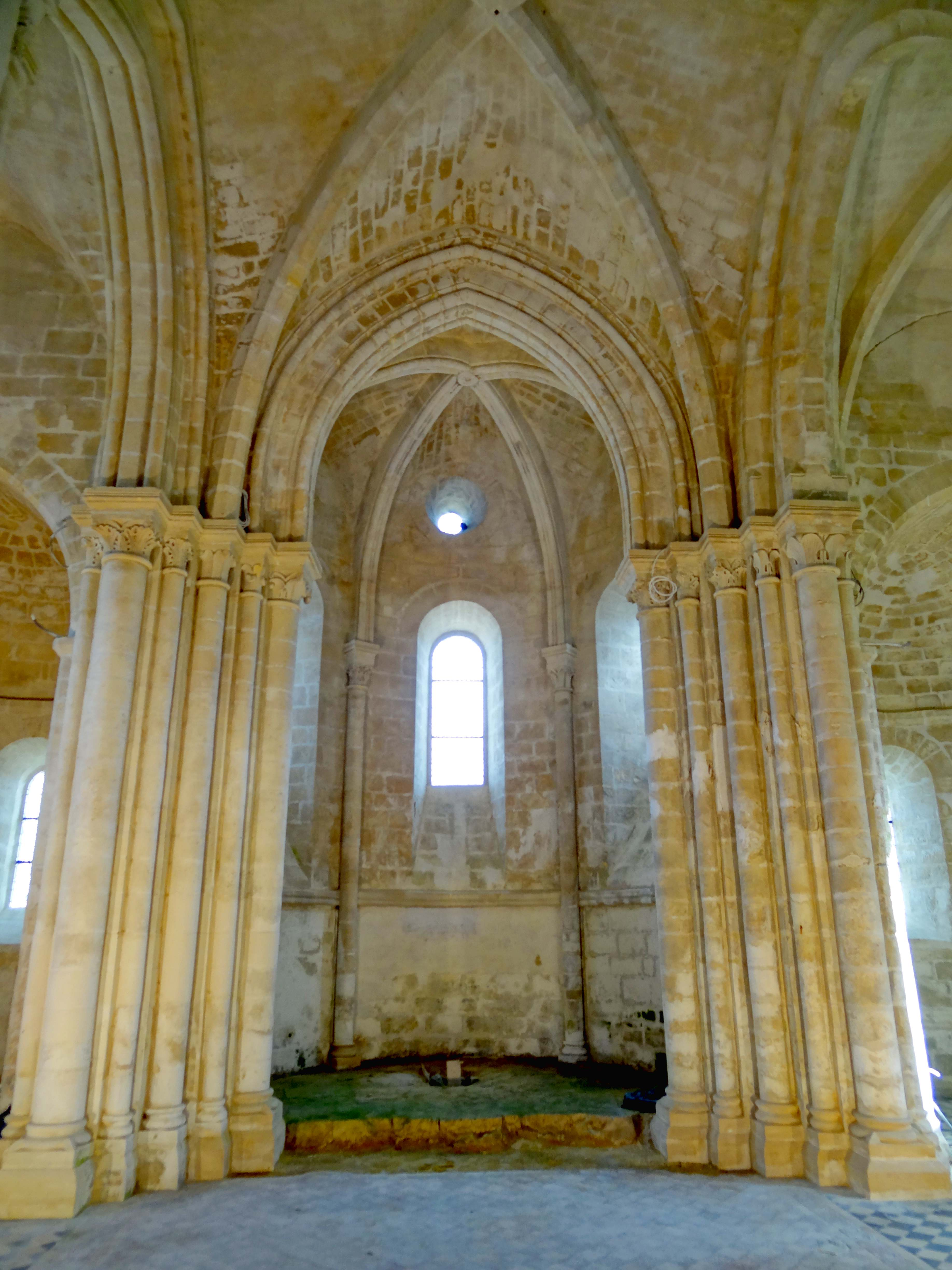 Intérieur de l'église - voir titre.